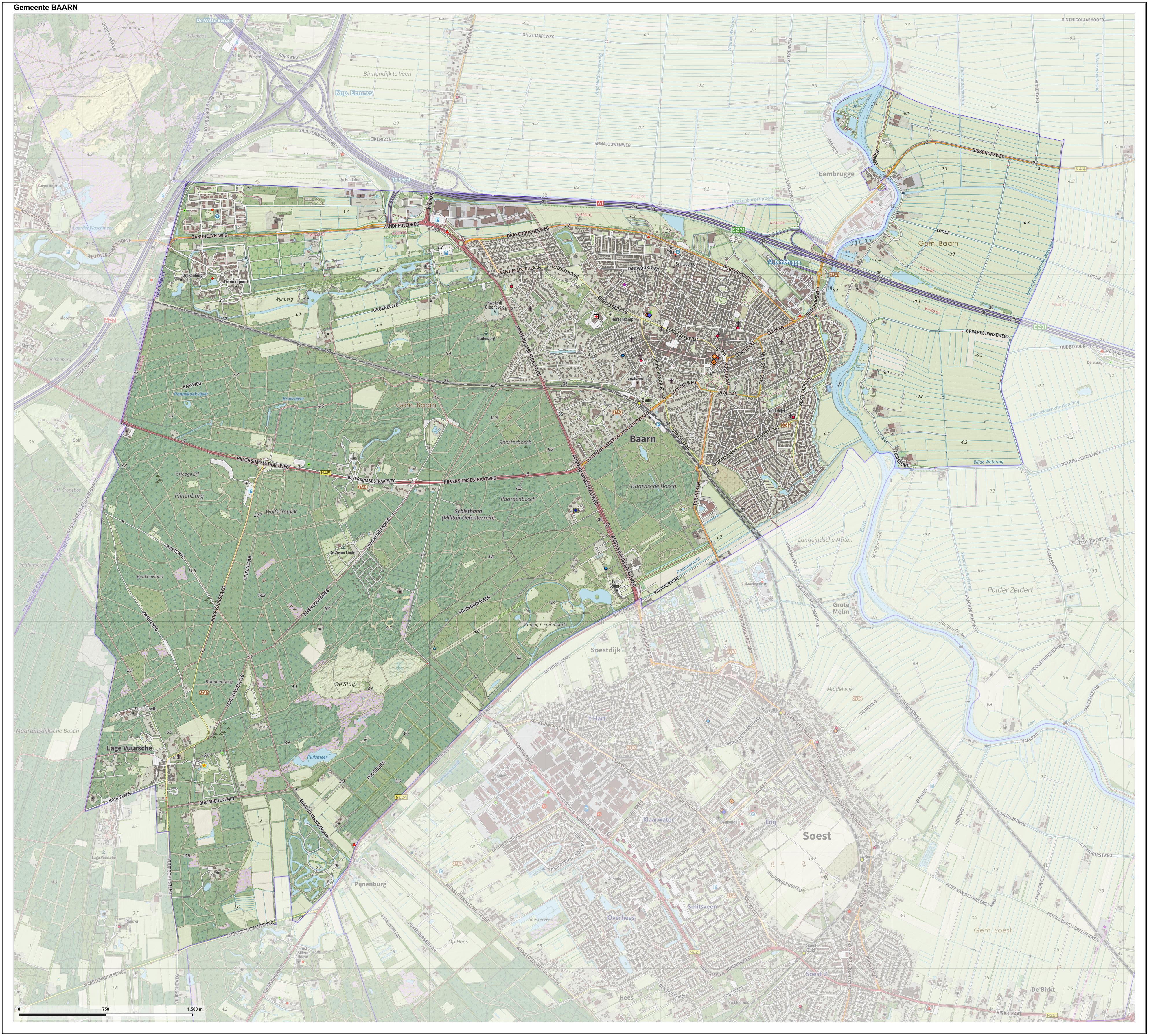 Topografische gemeentekaart. Resolutie: 400 pixels/km. Kaartbeeld samengesteld uit de open geodata van de Top10NL en Top25namen (Kadaster), Creative Commons-BY licentie. Gebouwvlakken uit open geodata BAG extract. Wegen uit de OpenStreetMap, OpenStreetMap community. Reliëfschaduw uit de Actuele Hoogtekaart AHN2. Samenstelling en kleurenschema: Jan-Willem van Aalst, met QGIS. Zie ook de Legenda.